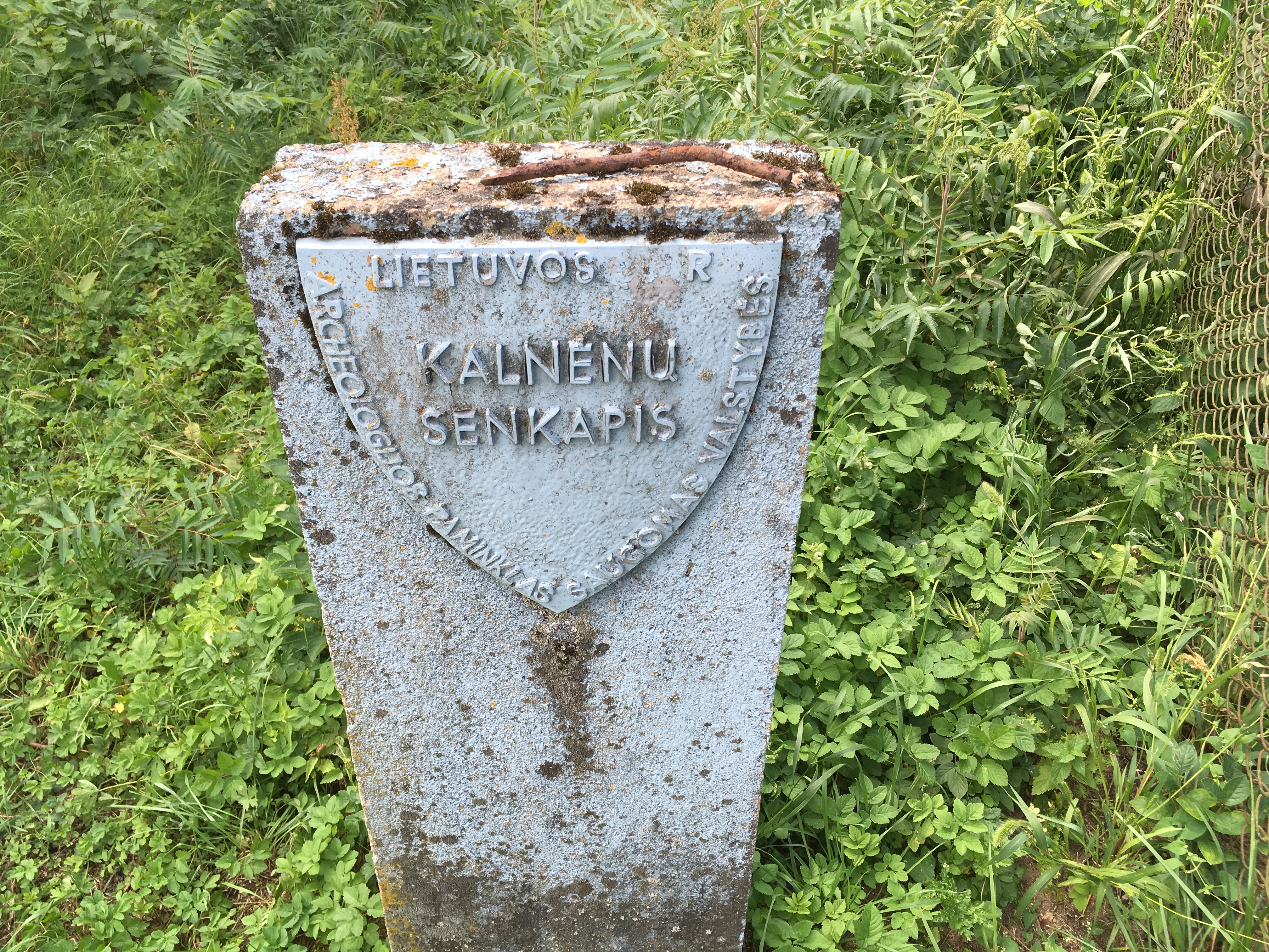 Kalnenu senkapio zymuo